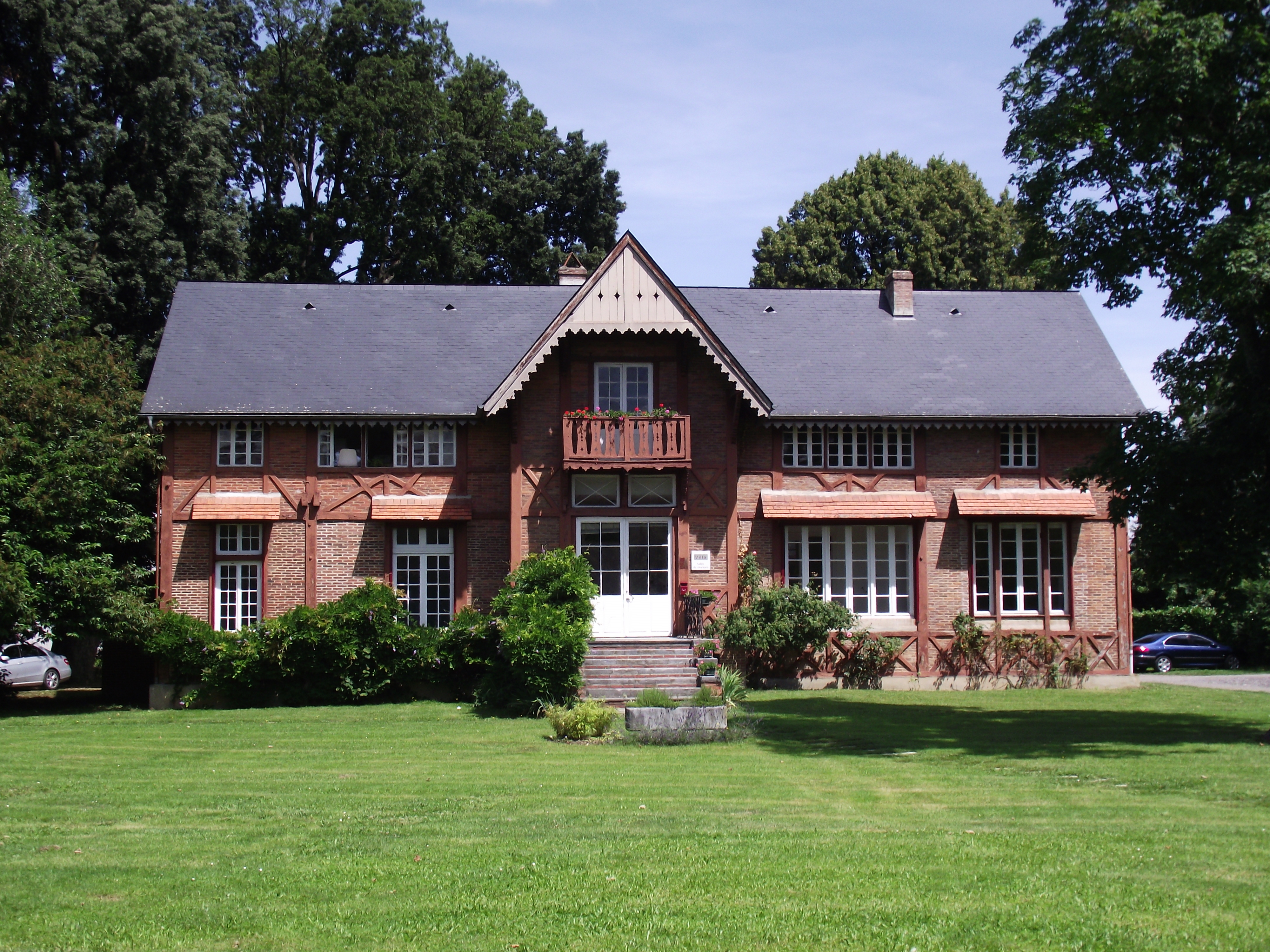 Villa de l'ENIT (Hautes-Pyrénées, France)